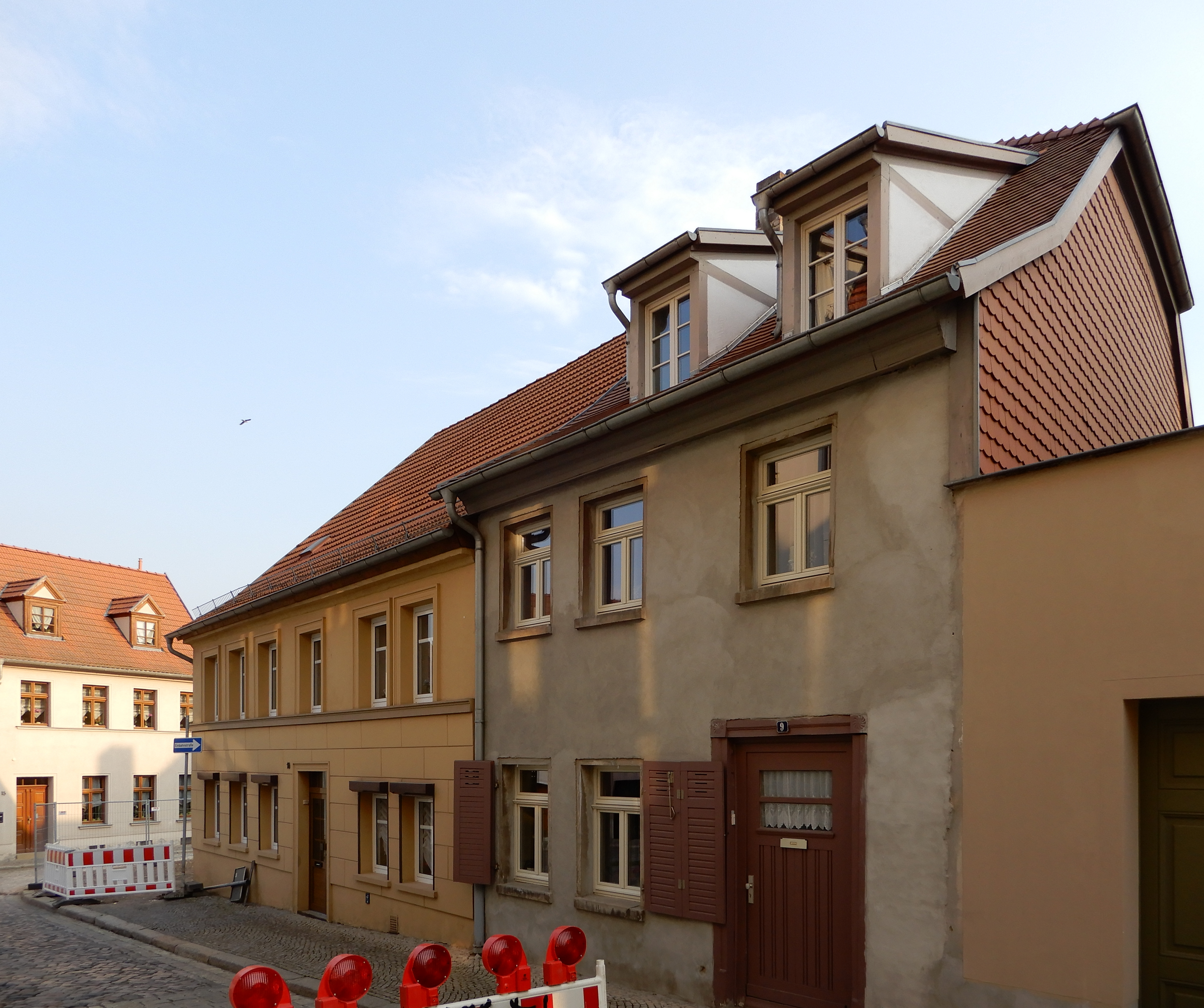 Gebäude Liebenwahnscher Plan 9 in Aschersleben